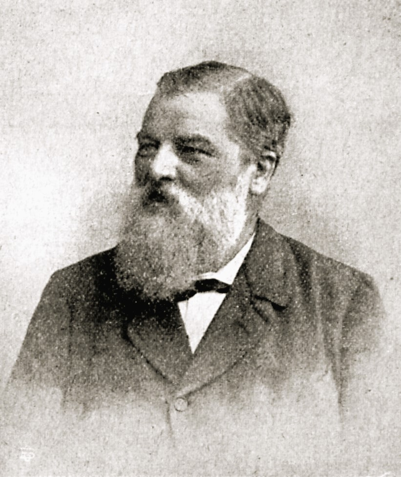 Stadtarchivar Dr. Karl Koppmann zu Rostock.